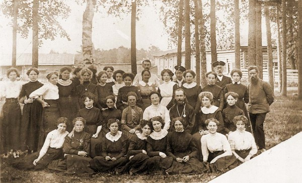 П. П. Бажов (стоит справа) среди учениц Епархиального училища. 1910 г. Рядом с Бажовым Валентина Александровна Иваницкая. В центре Сергий Александрович Увицкий